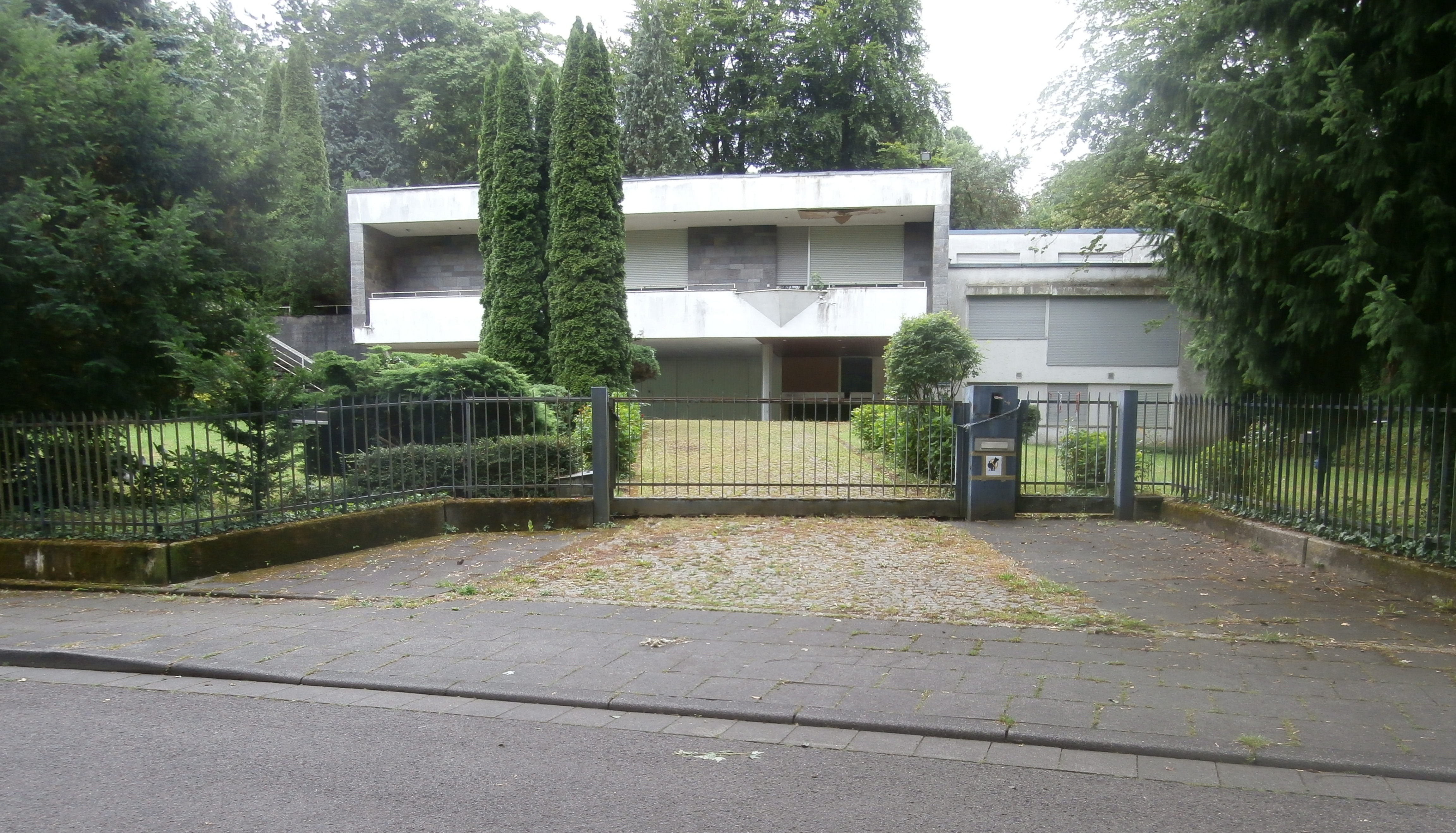 Ehemalige Residenz des Botschafters von Indonesien, Im Hag 24, Bonn-Mehlem. Architekt: Dirk Denninger